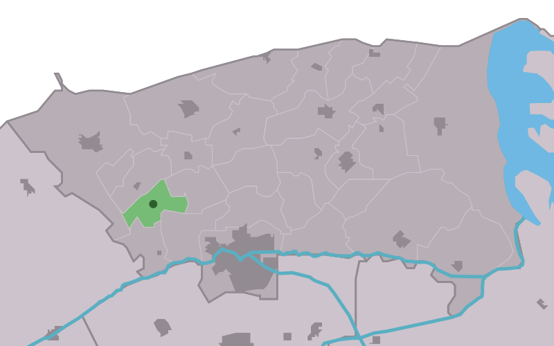 Kaartsje fan himrik fan Foudgum